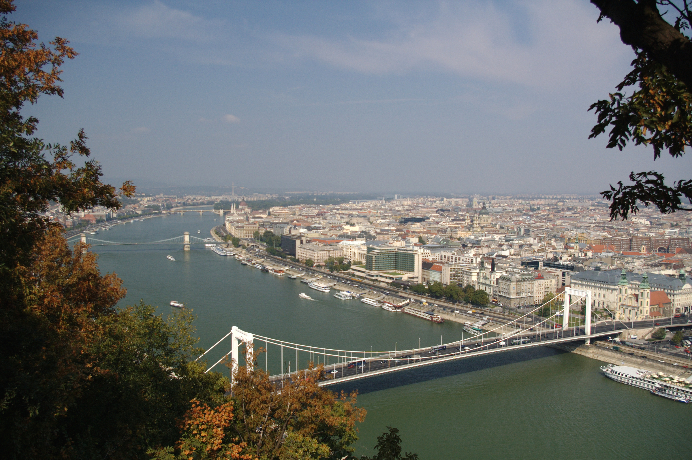 Blick vom Gellértberg auf Budapest und die Elisabethbrücke; im Hintergrund Kettenbrücke und Margaretenbrücke